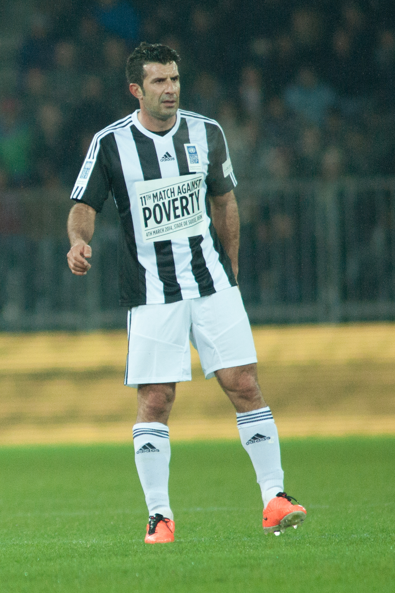 Football against poverty 2014 - Luis Figo